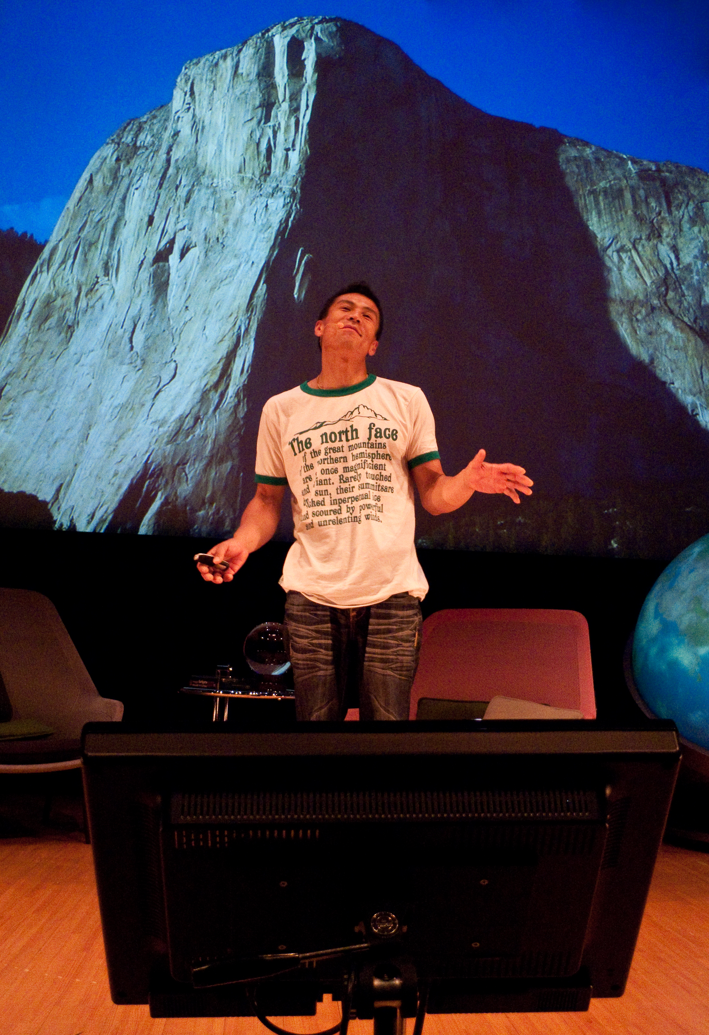 Yuji Hirayama at TEDxTokyo 2009